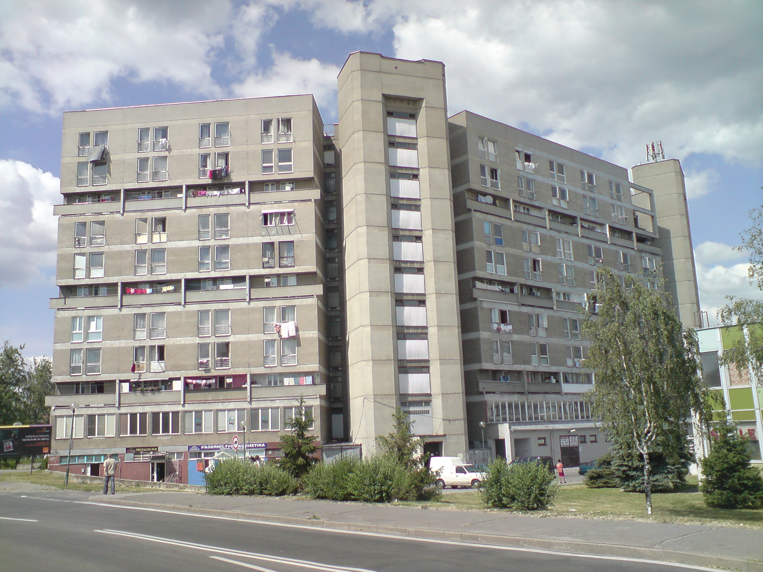 Pentagon, Vrakuňa, Bratislava II